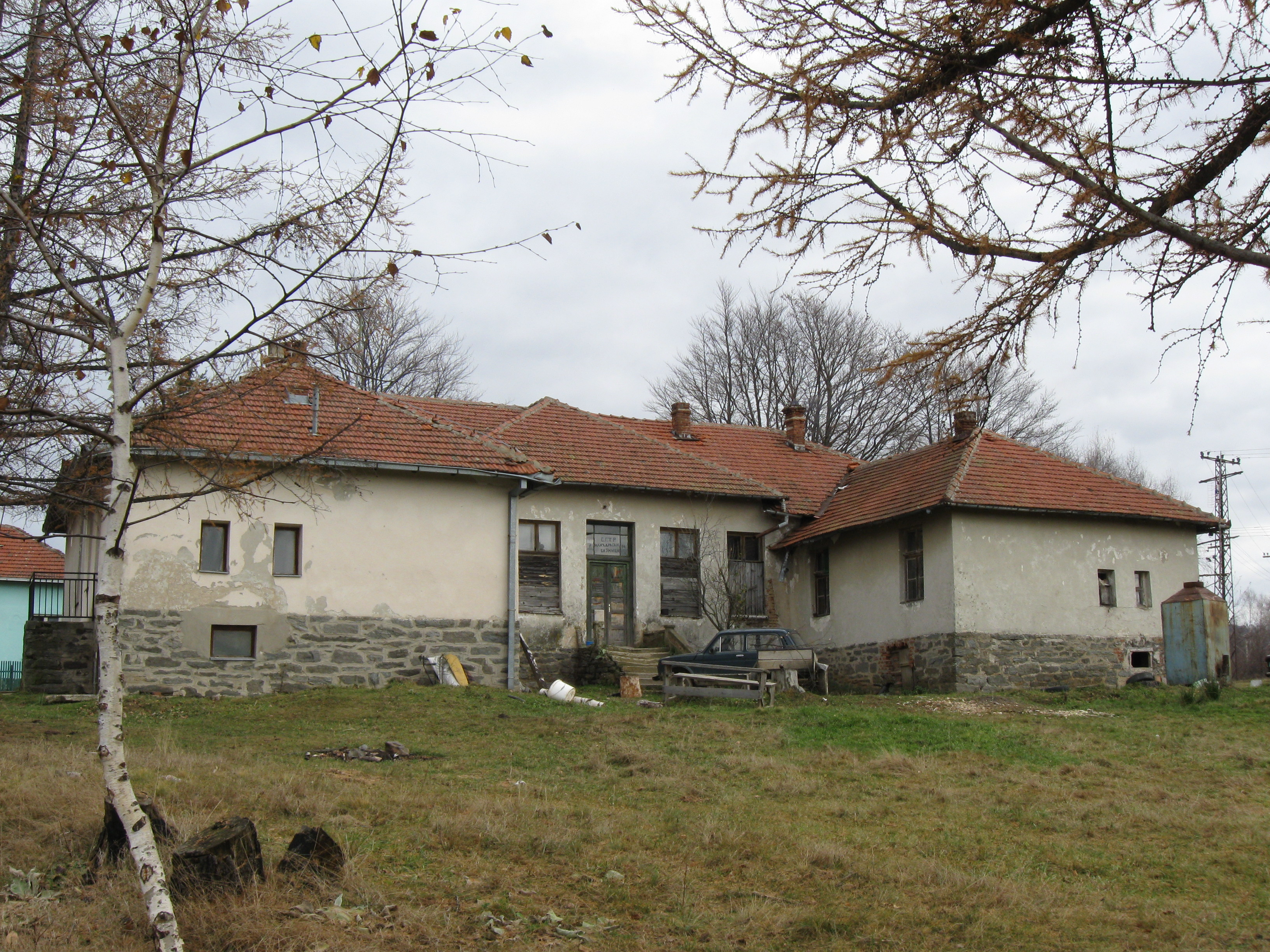 Škola na Mlačiškim Mehanama